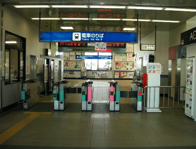 梅郷駅改札口